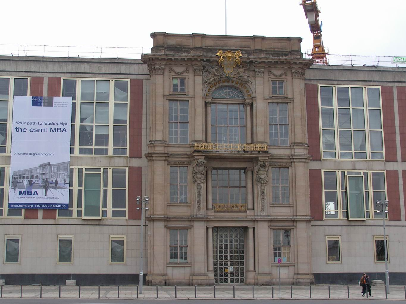 Das 1964 fertiggestellte Staatsratsgebäude, Sitz des Staatsrats der DDR, im heutigen Berlin-Mitte. Das Foto fokussiert auf das in den Bau integrierte Portal IV des 1950 gesprengten Berliner Stadtschlosses, von dessen Balkon aus Karl Liebknecht am 9. November 1918 im Zuge der Novemberrevolution die „Freie Sozialistische Republik“ ausgerufen hatte.